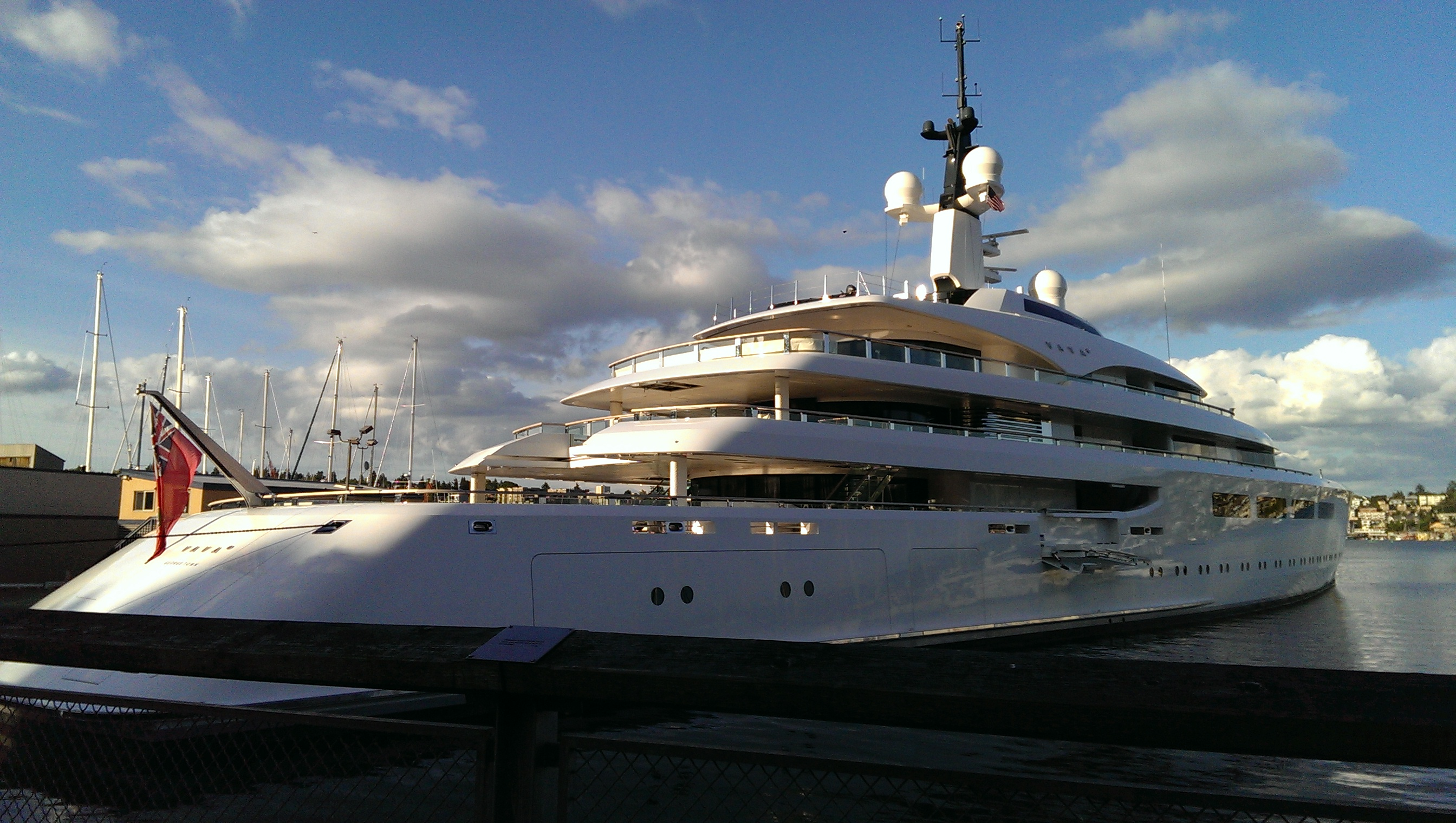 Vava II